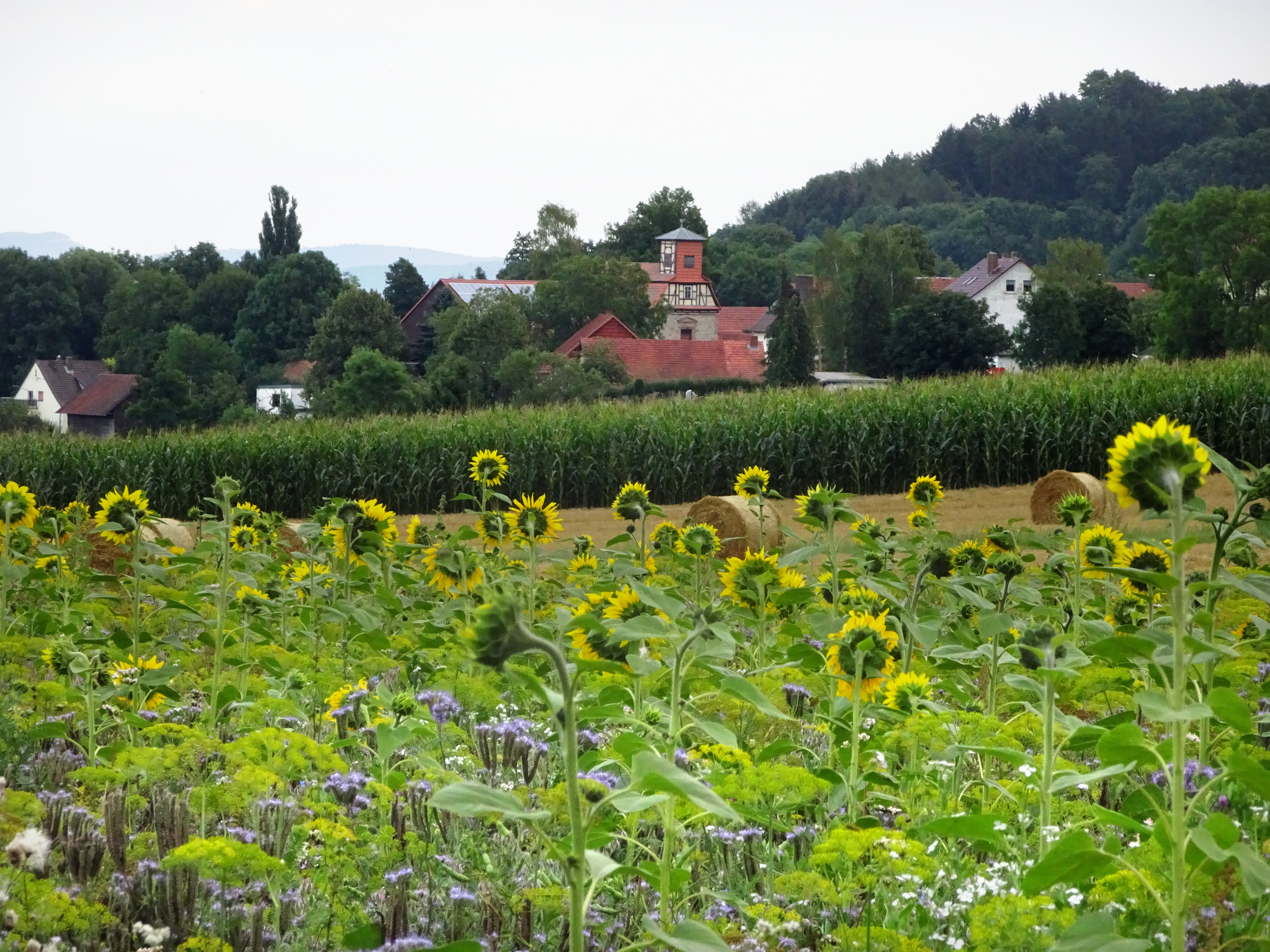 Lüderbach, Gemeinde Ringgau im nordhessischen Werra-Meißner-Kreis. Als "Luderbech" erstmals 1195 erwähnt liegt der Ort etwa zwei Kilometer von der früheren innerdeutschen Grenze und heutigen Landesgrenze zu Thüringen entfernt. In der Bildmitte die evangelische Pfarrkirche des Ortes. Durch Lüderbach führen der Herkules-Wartburg-Radwanderweg, der Werra-Burgen-Steig Hessen (X5H) und der Elisabethpfad.